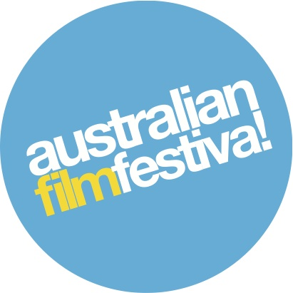 Australian Film Festival Logo